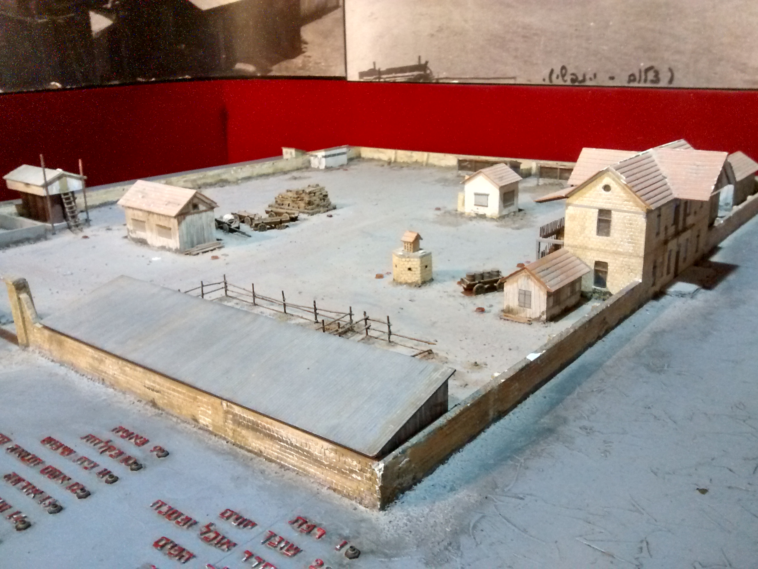 מוזיאון החצר הישנה עין שמר